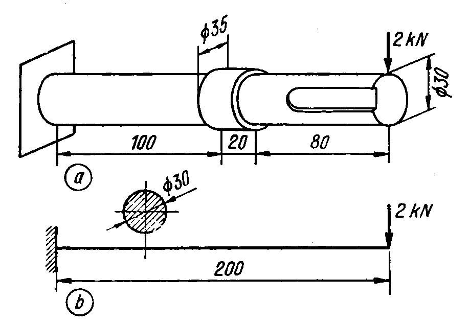 Tugevusõpetuse detailide liigid